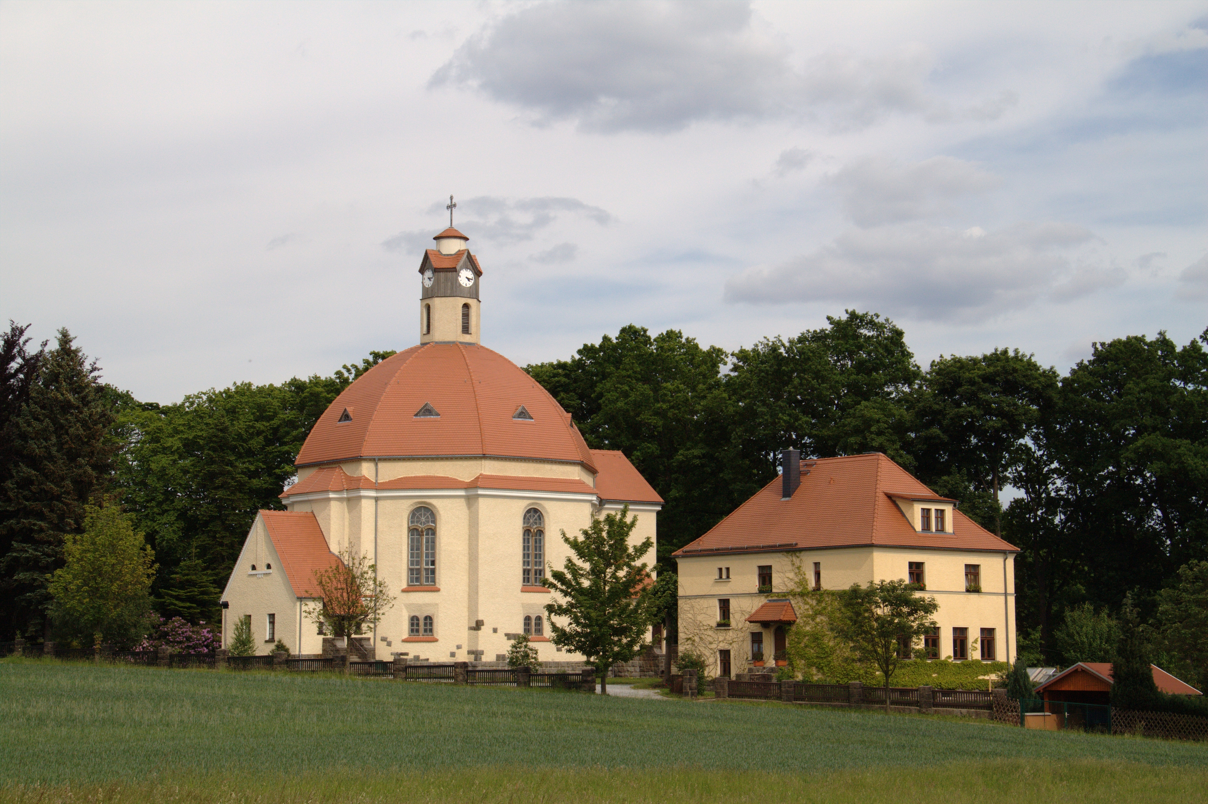 evangelische Johanneskirche mit Pfarrhaus in Kirschau, Sachsen